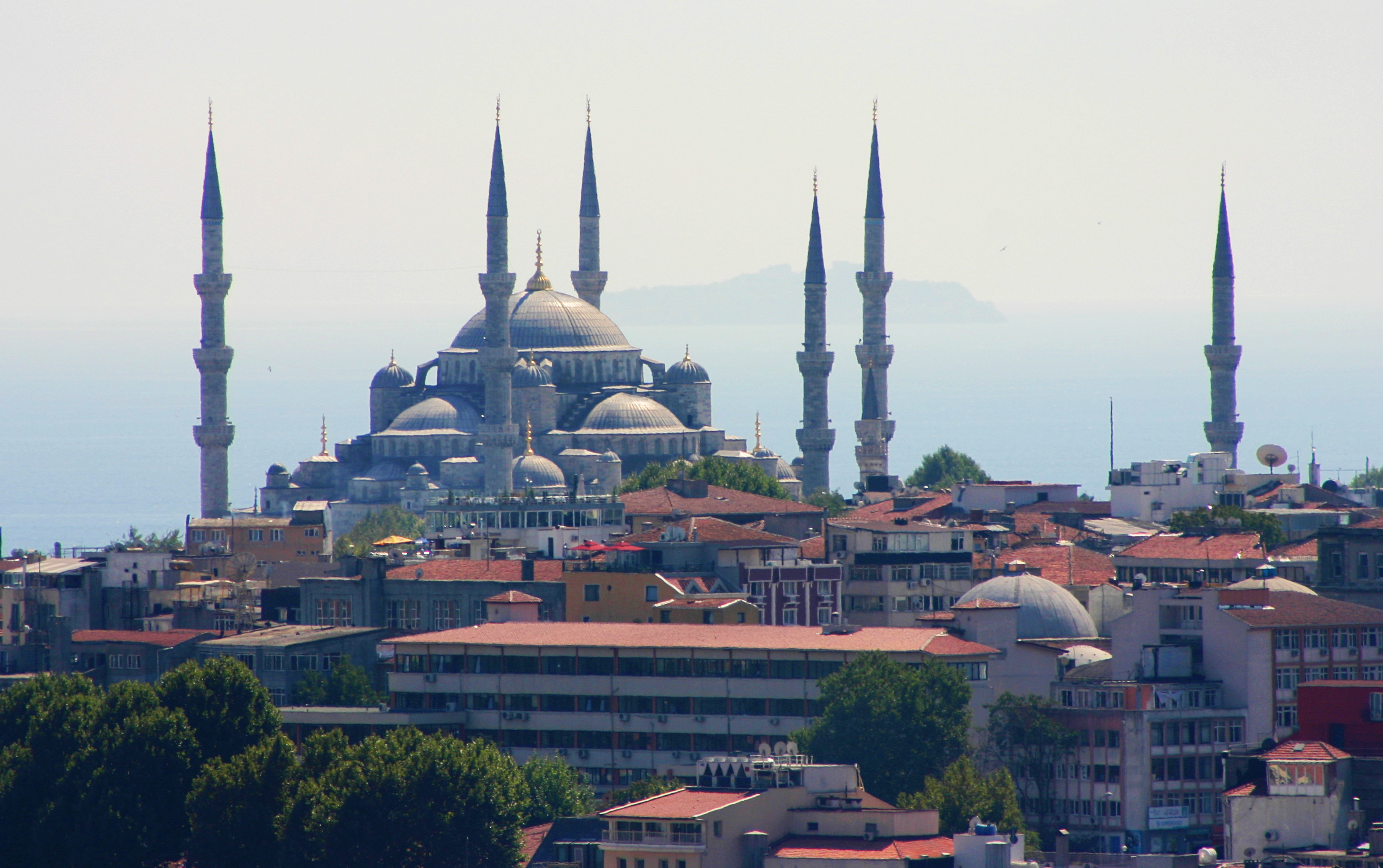 Vista da Mesquita Azul a partir da Torre de Gálata